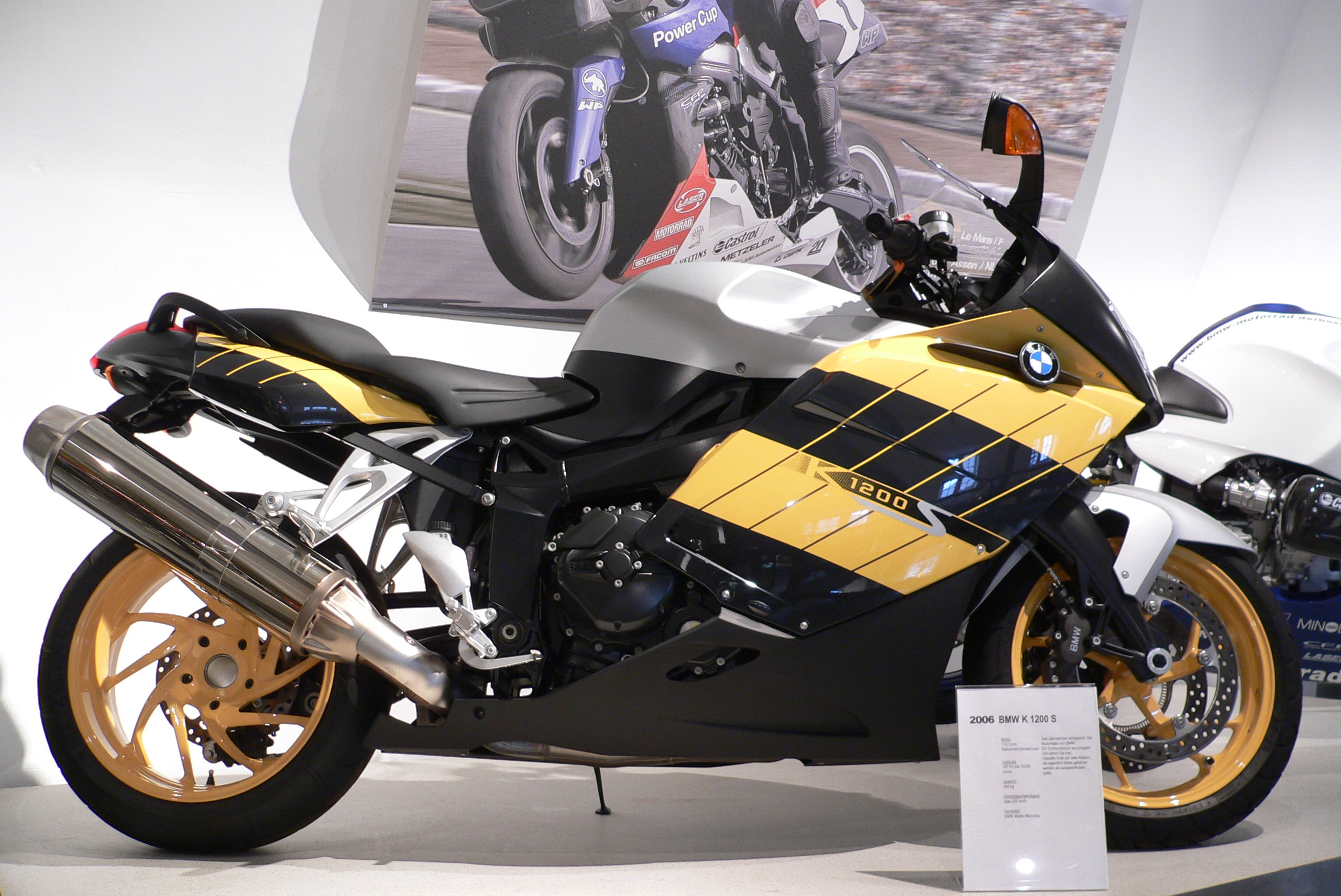 Motorbike "BMW K1200S" (2006) at the Deutsches Zweirad- und NSU-Museum (1157 cm³, 167 PS bei 10.250 U/min., 200 km/h)